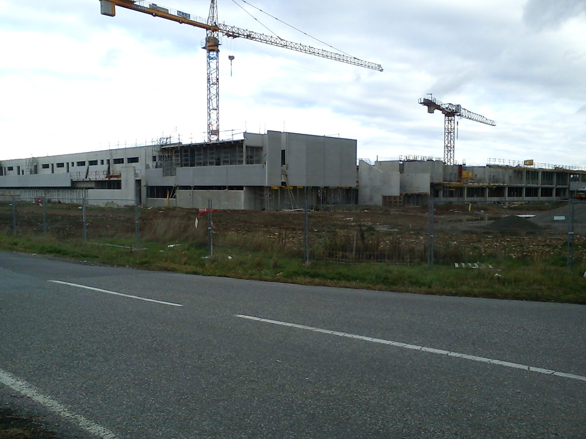 Noé (Haute-Garonne, France) : Le collège en construction.